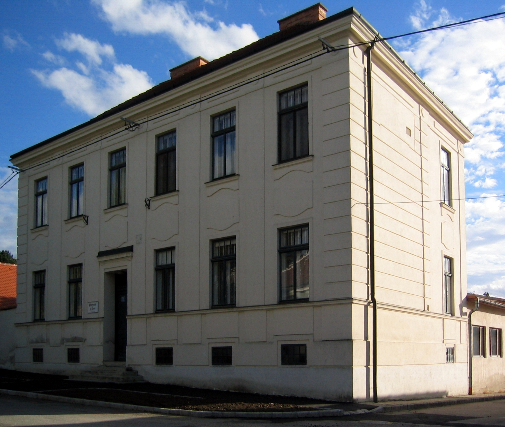 Sitzendorf Hauptplatz 11, Pfarrhof